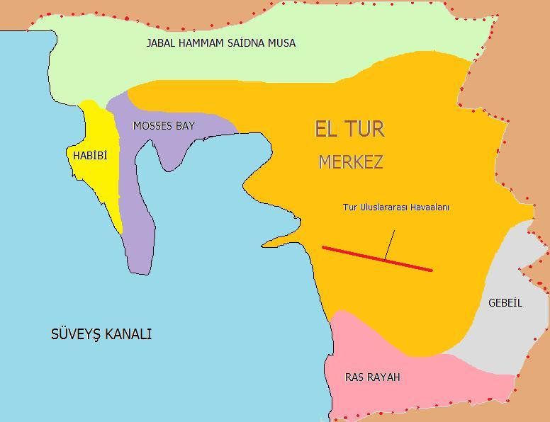 Tur ve Havaalnı Türkçe harita.